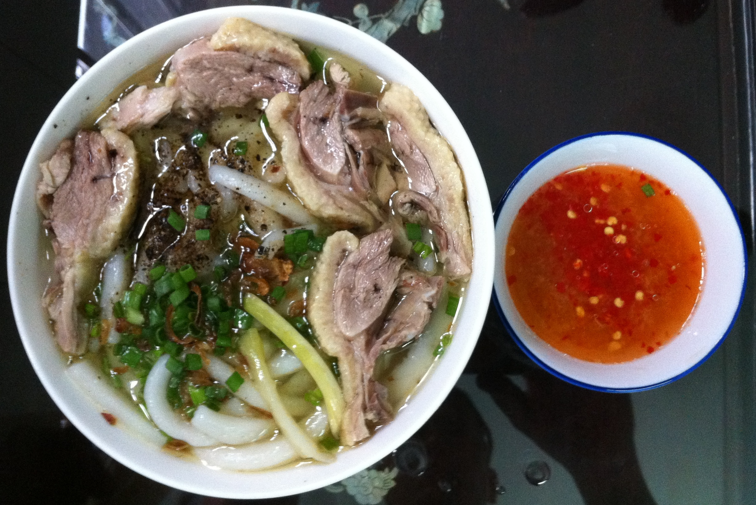 Bánh Canh Vịt